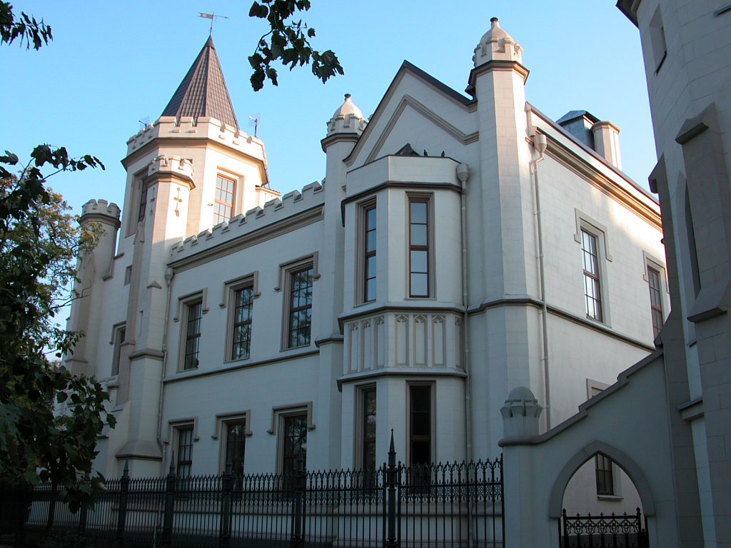 Шахский дворец